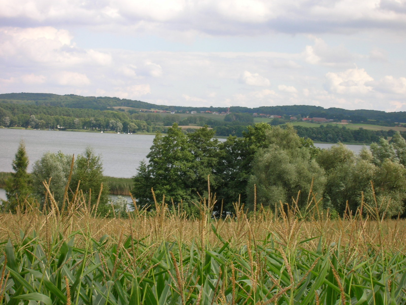 Oberuckersee - Blick von Fergitz auf Südlichen Teil des Oberuckersee, Blick auf Turnersruh in Warnitz und Melzow